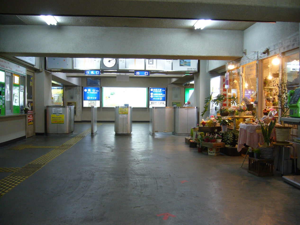 京都市右京区太秦帷子ヶ辻町にある京福電気鉄道帷子ノ辻駅の地下改札付近。右側には当時は花屋が入居していた。2009年1月23日に投稿者が撮影。